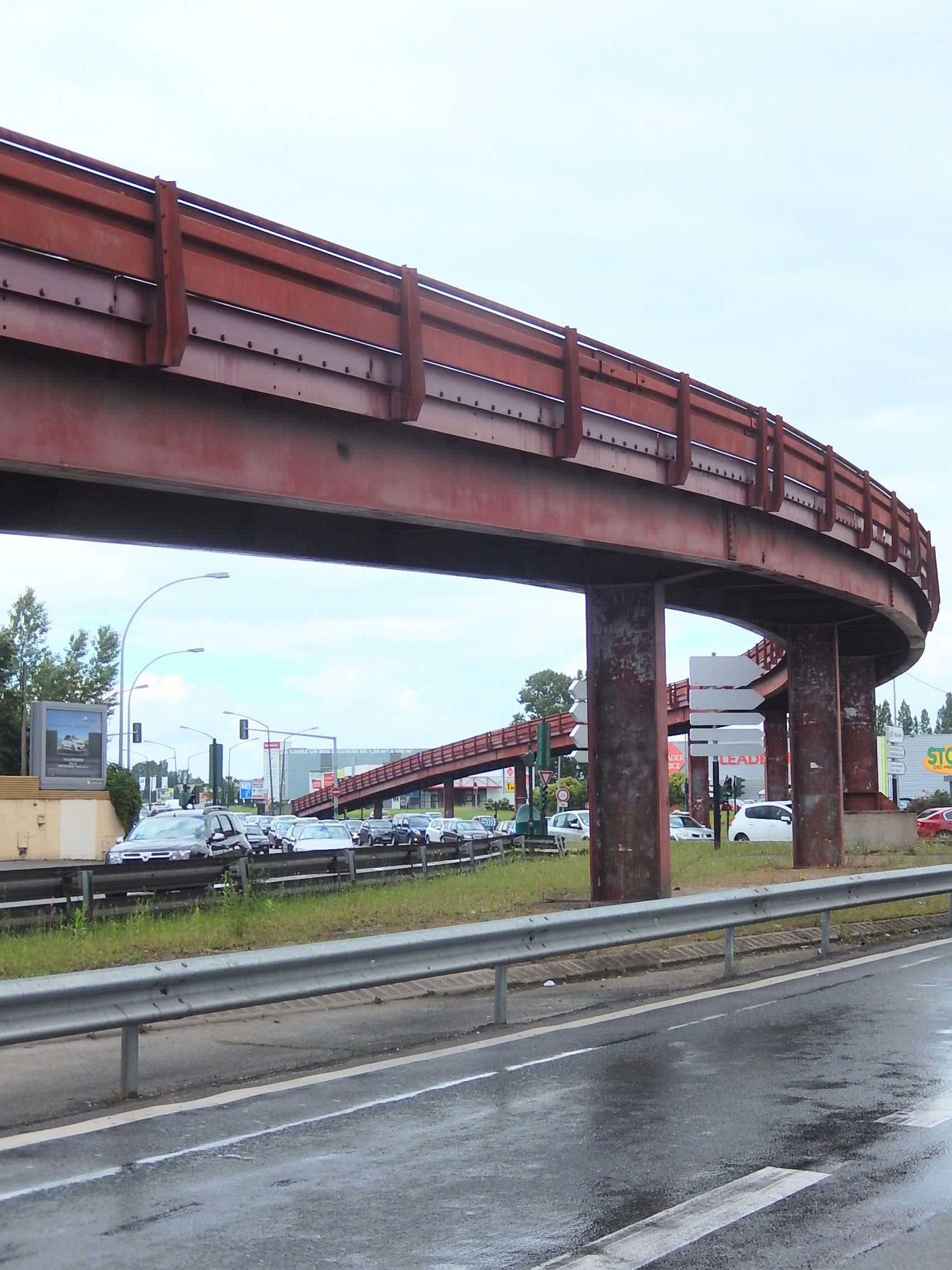 L'autopont à sens unique survolant la Place Latule, à Bordeaux. Installé en 1972, il permet aux automobilistes en provenance de la place Ravezies de rejoindre la rocade, plus au Nord, en évitant les feux tricolores de la place Latule.